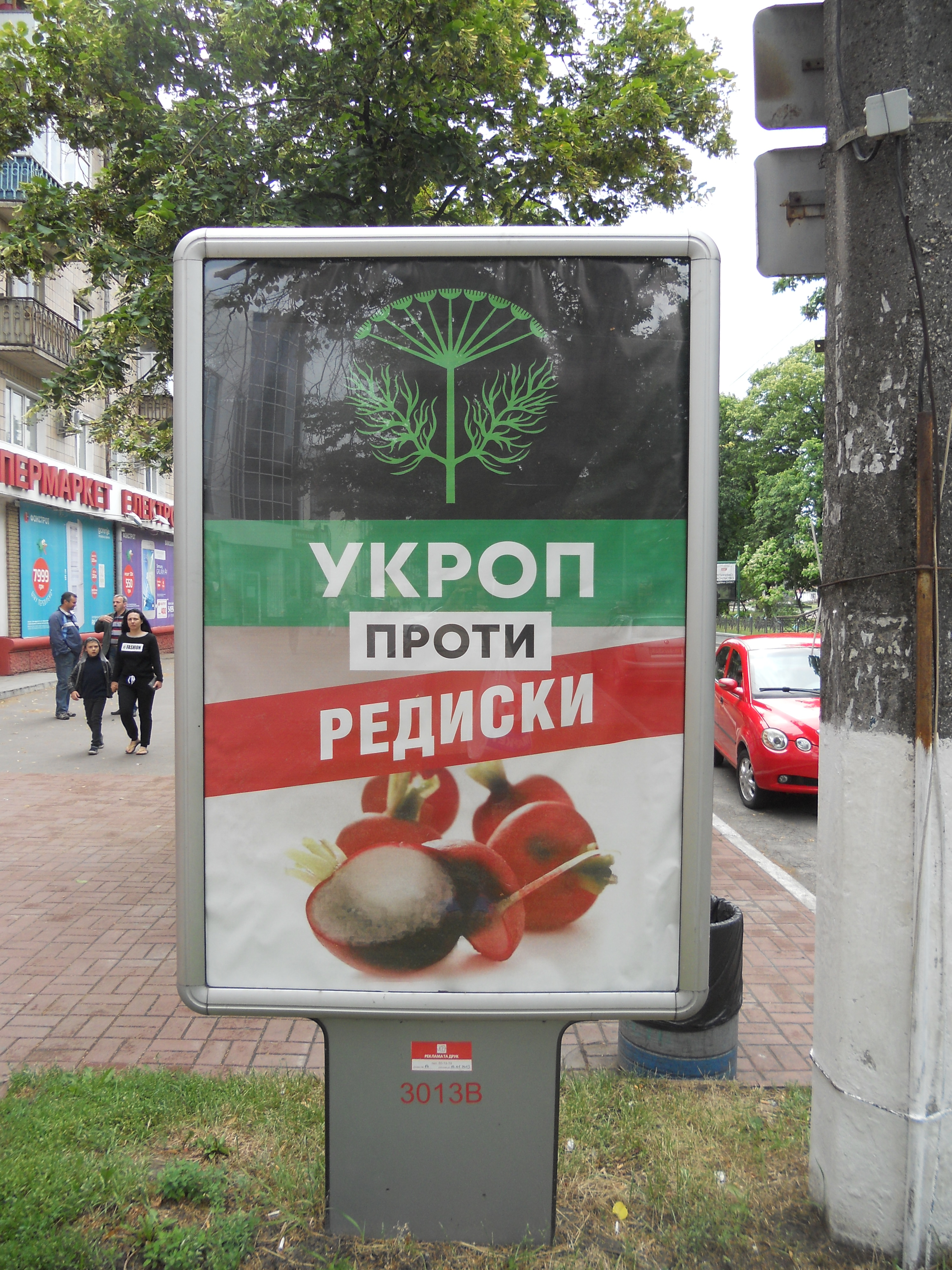 Укроп проти редиски - агітплакат Корбана, вибори на 205 окрузі, Чернігів